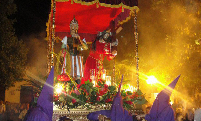 Paso santa fereño,en pleno de procesion